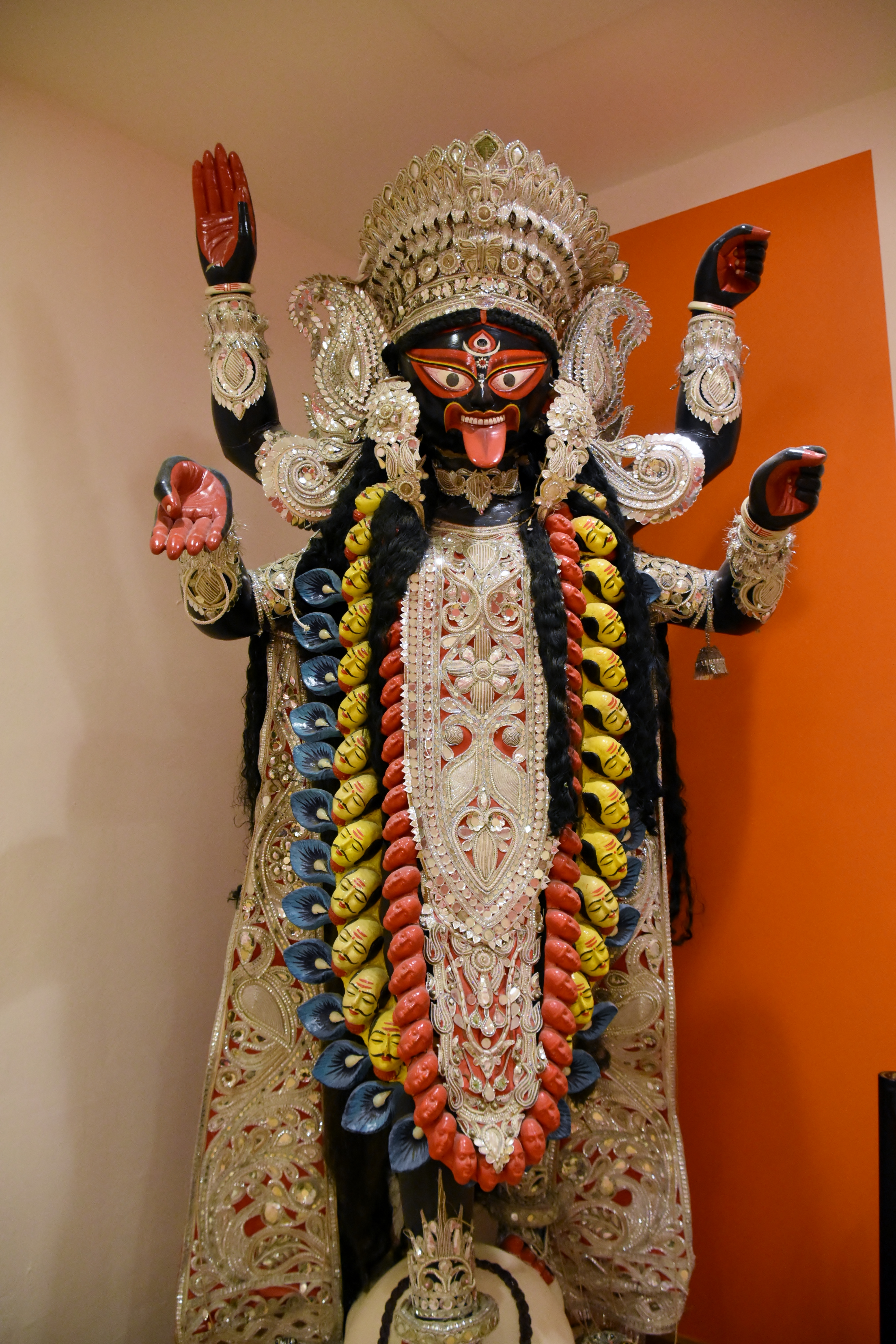 Hindu goddess Kali, National Museum, Copenhagen (4)